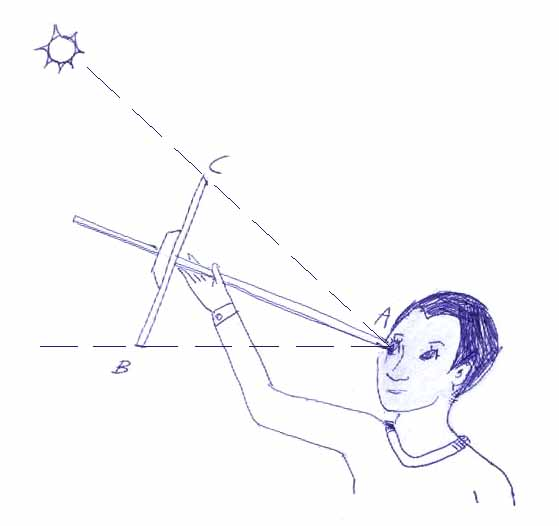 zelfgemaakte tekening